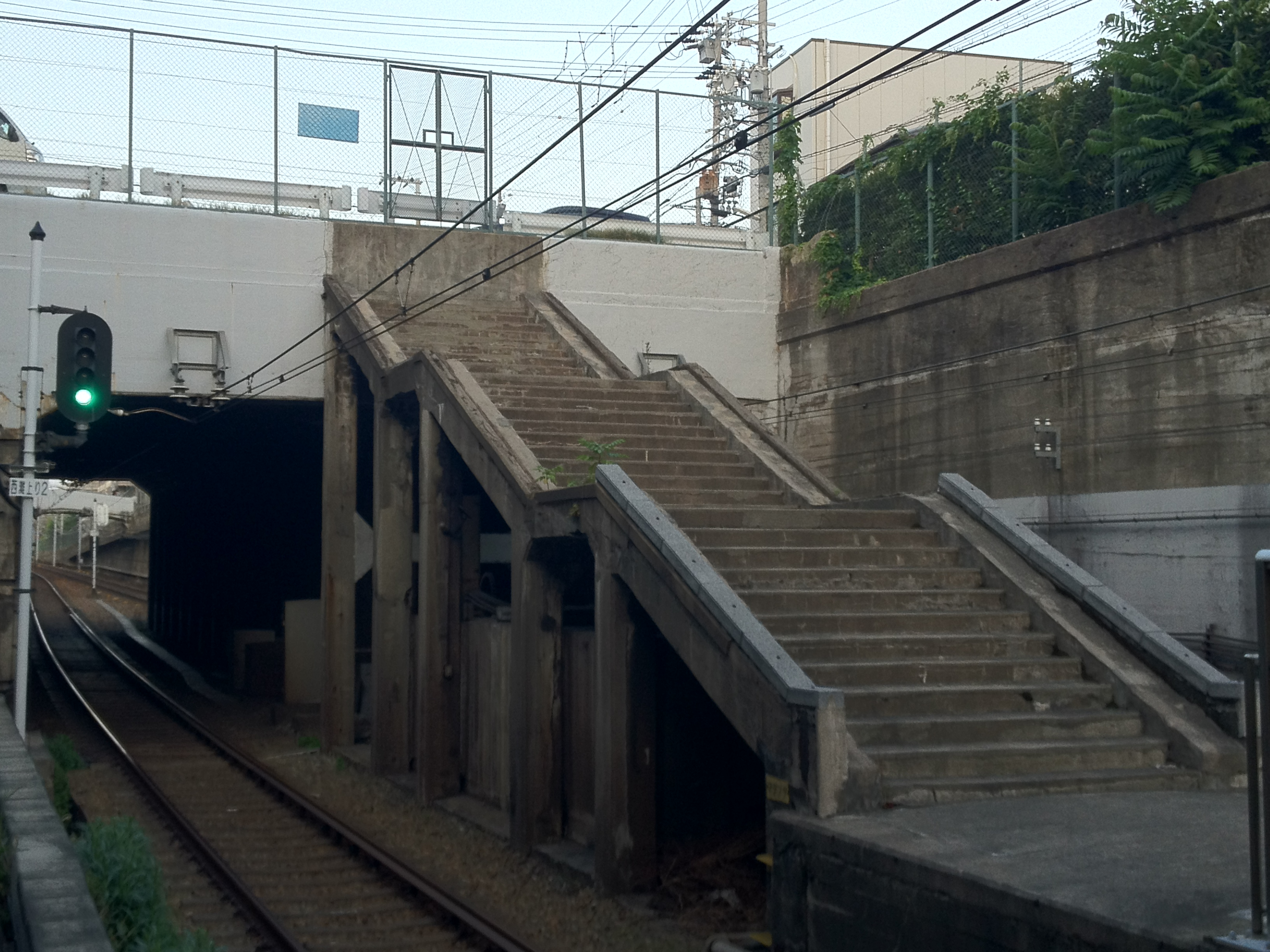 阪神岩屋駅の東口跡。階段の上は阪神系の会社が所有する駐車場となっている。